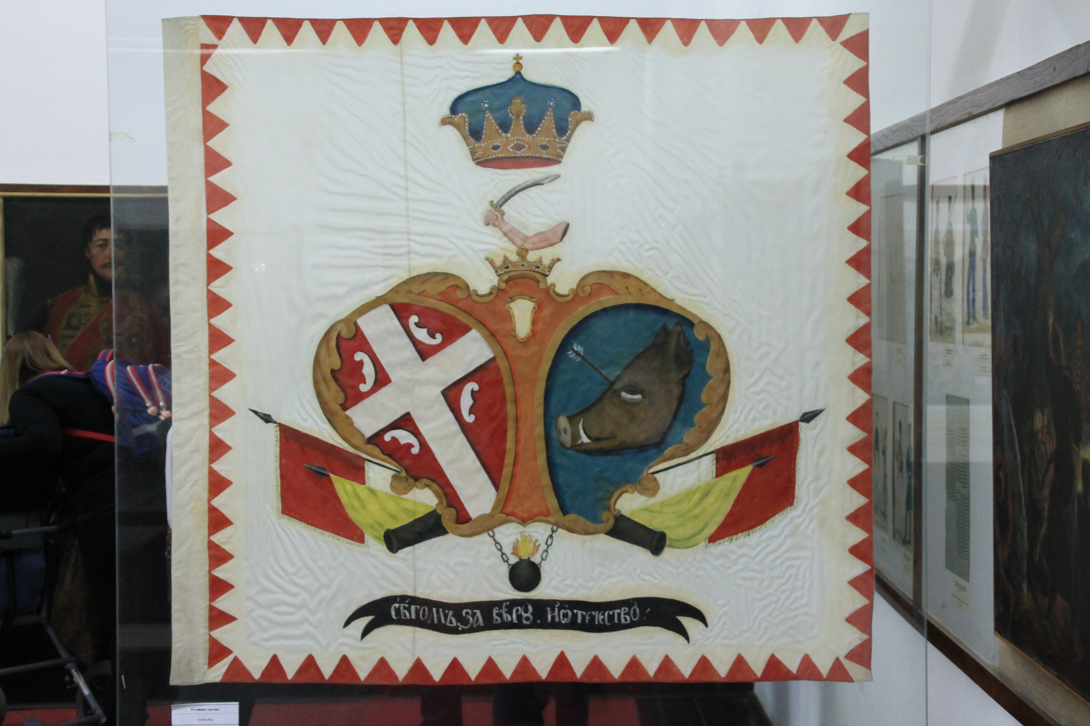 Karađorđev konak